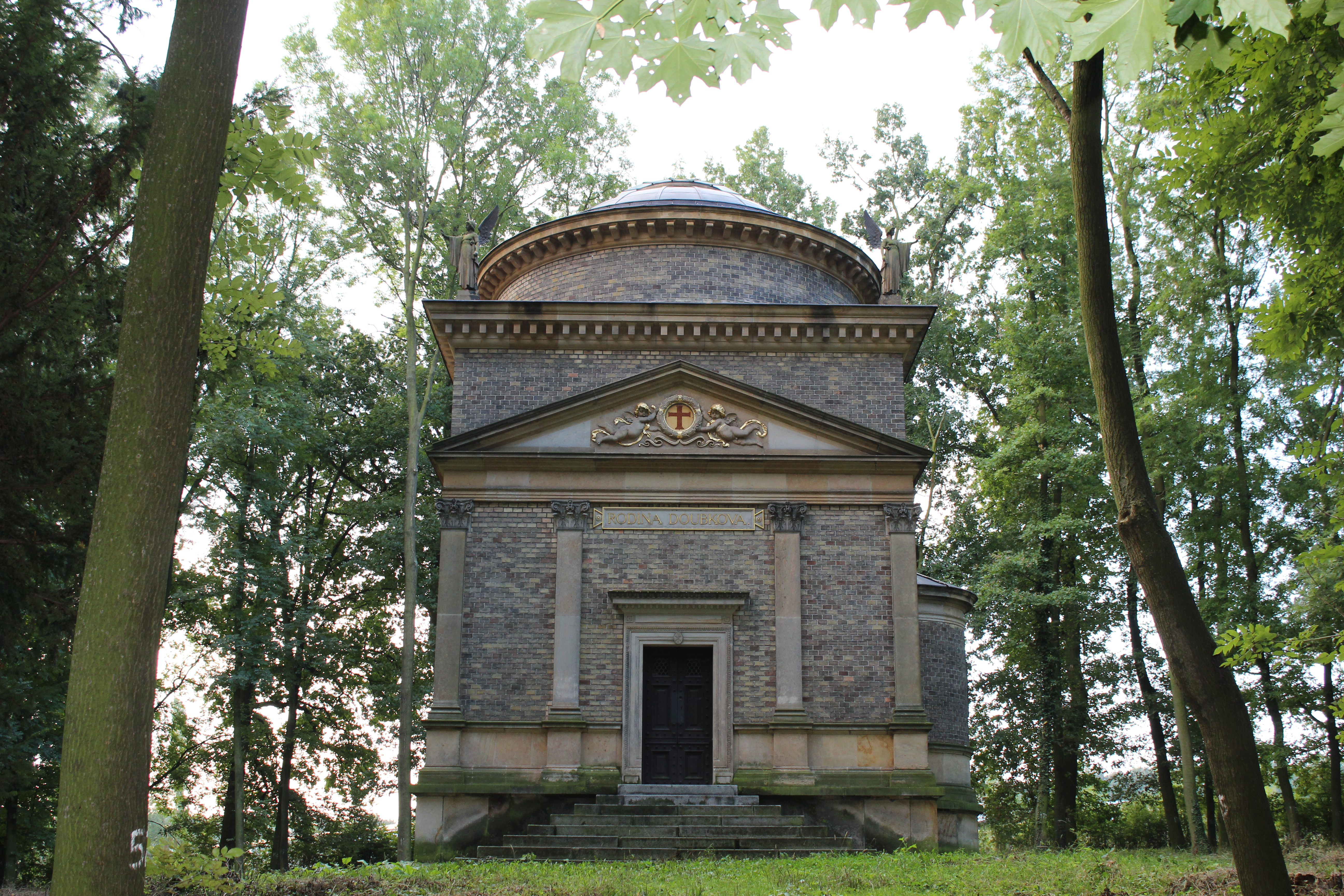 Hrobka rodiny Daubkovy od Antonína Wiehla. Pohled na průčelí kaple ve směru na jih z parku mezi hrobkou a Nádražní ulicí na východním okraji Litně. Na snímku je patrná novorenesanční centrála, zdi z neomítnutých cihel, hlavice sloupů, použití neomítnutého kamene - pískovce na podezdívce, čtvercový půdorys evokující panteon. V tympanonu nad vchodem dvě letící postavičky dětí (putti) nesoucí vavřínový věnec s mozaikovou výplní červeného kříže na žlutém pozadí (autorem návrhu tympanonu je J. V. Myslbek, 1888). Nad vchodem je pískovcový pás s nápisem RODINA DOUBKOVA. Na ploché plechová střeše osazen tambur s nízkou kupolí a skleněnou vitráží. Nároží kaple jsou zdobena čtyřmi sochami andělů s kovovými křídly.